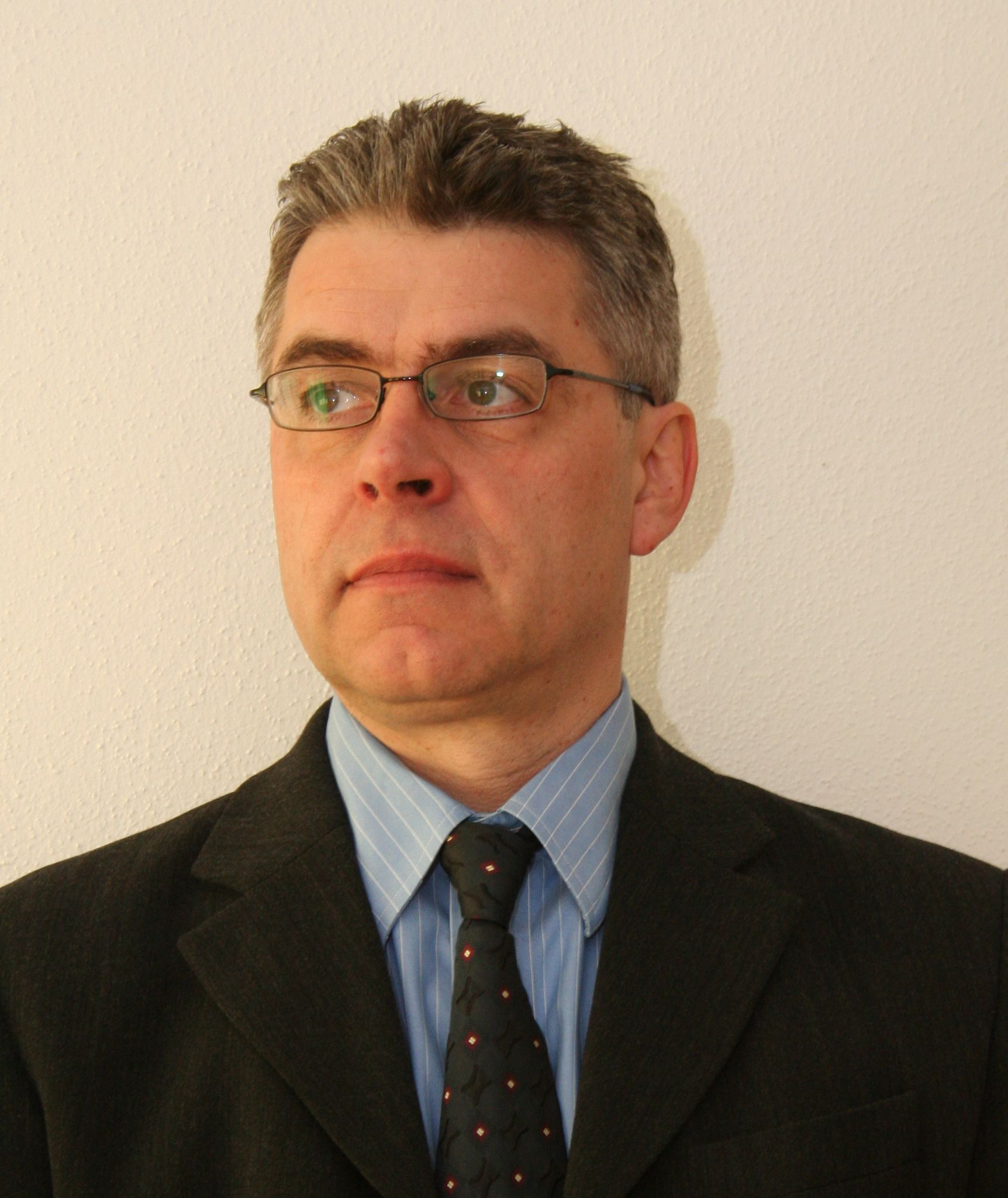 Das Foto zeigt Hans-Jürgen Gerung